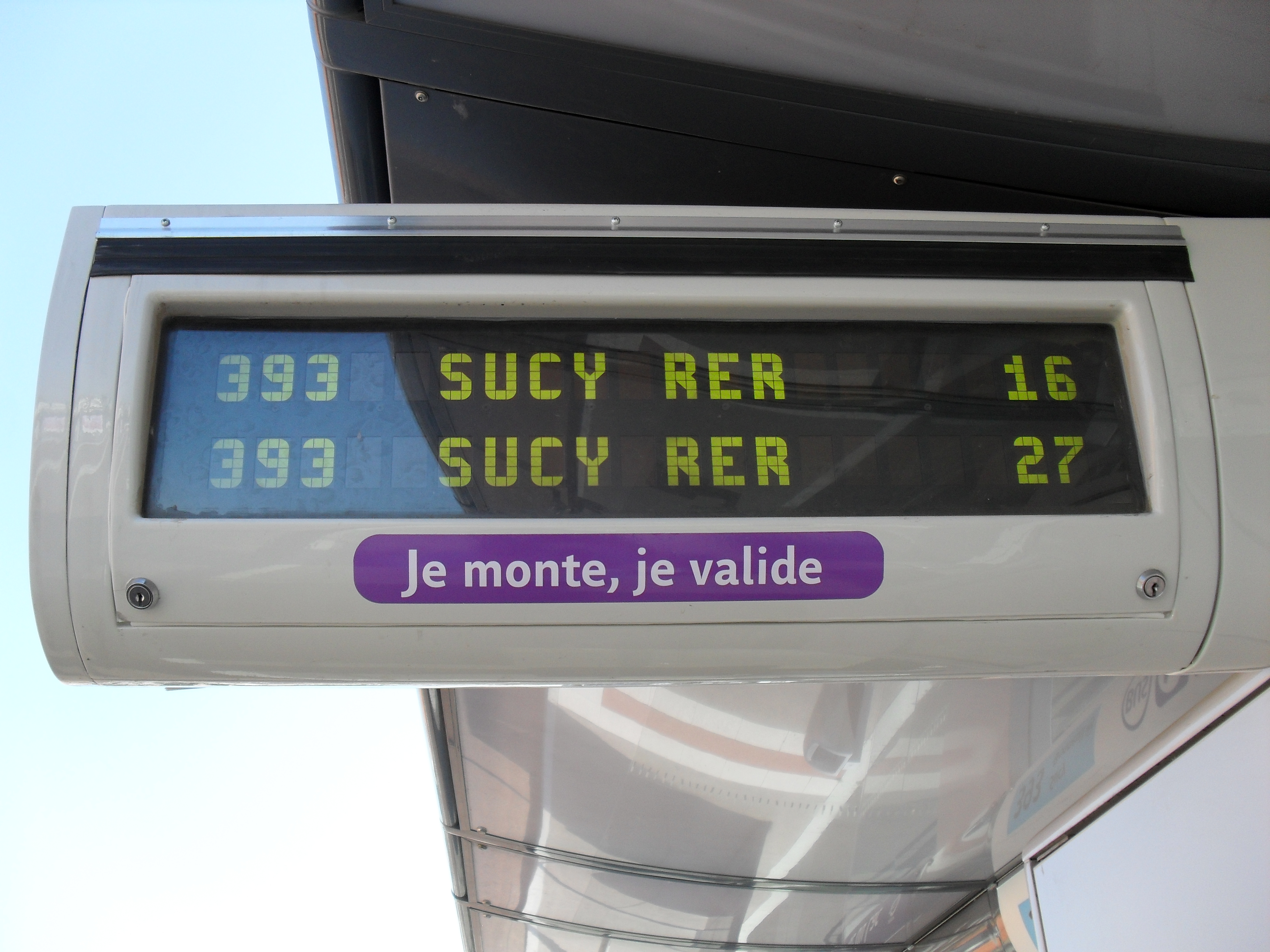 SIEL en station de Pointe du Lac sur la ligne RATP 393, quai direction Sucy RER